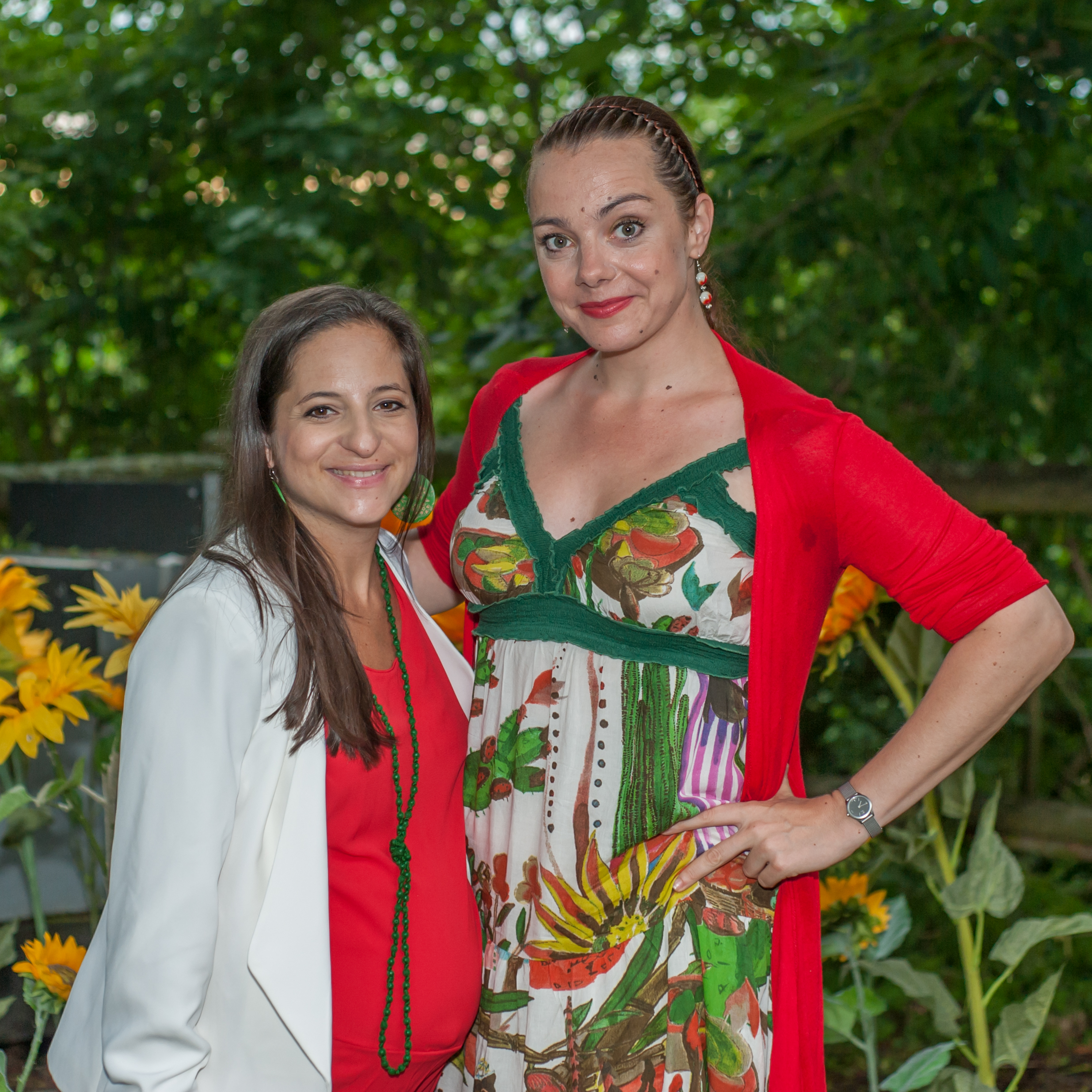 Sommernachtskomödie Rosenburg 2016, Premiere von Kalender Girls am 30. Juni 2016. Bild zeigt die Kernölamazonen.